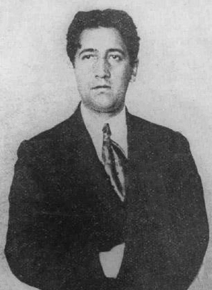 Victor Domingo Silva en 1935. Víctor Domingo Silva Endeiza (Tongoy, Región de Coquimbo, 12 de mayo de 1882 - Santiago, Región Metropolitana de Santiago, 20 de agosto de 1960) fue un escritor, dramaturgo, poeta, periodista y diputado chileno de origen vasco,1 que fue galardonado con el Premio Nacional de Literatura en 1954 y Premio Nacional de Teatro en 1959.